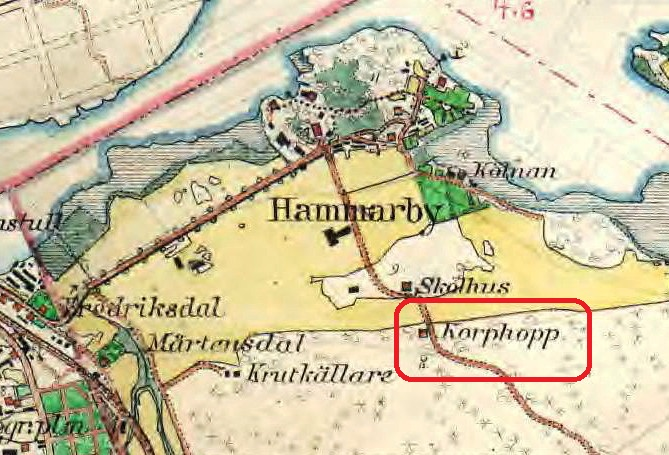 Lägenheten Korphopp (under Hammarby gård) på Häradsekonomiska kartan